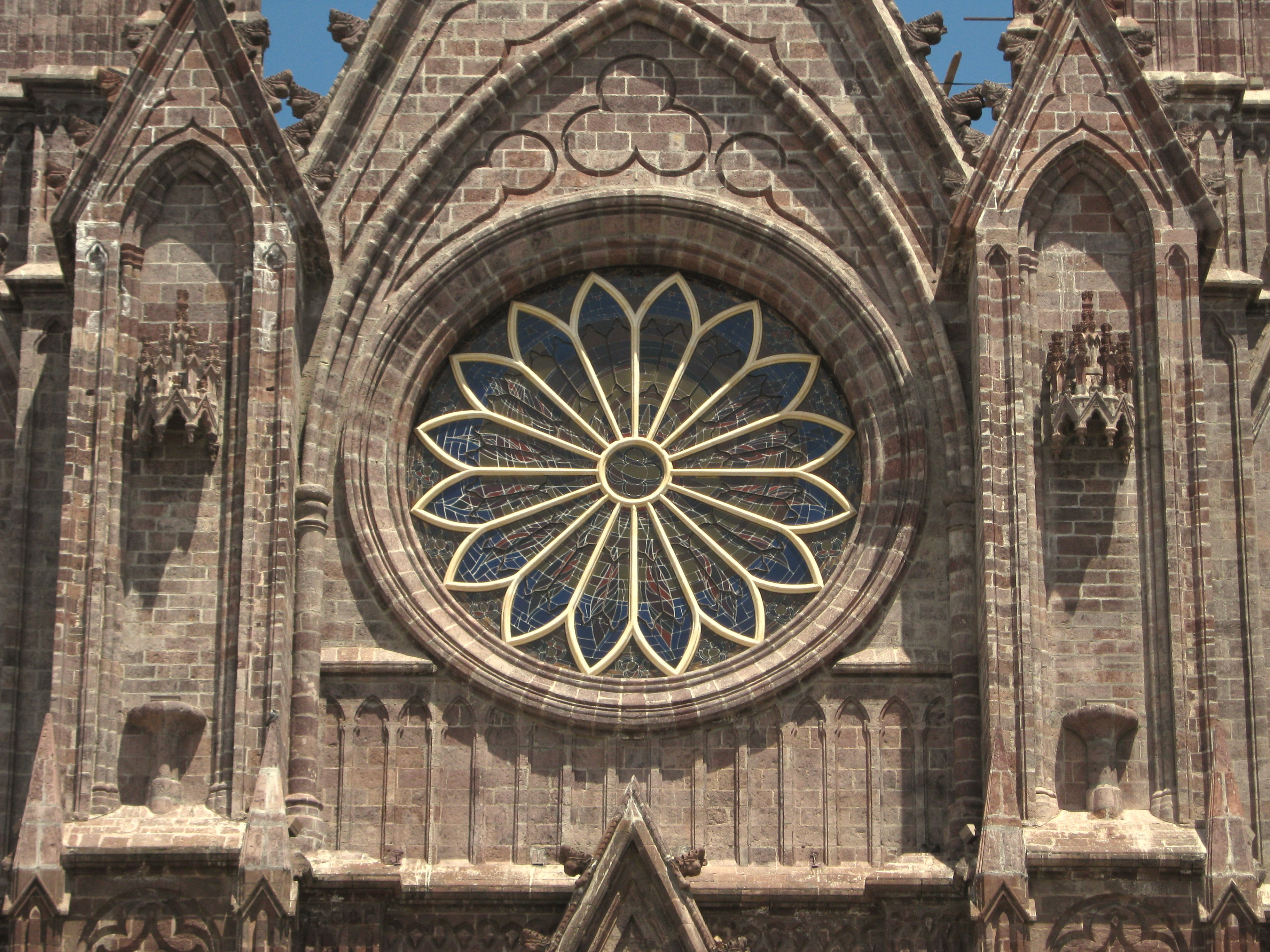 Rosetón del santuario guadalupano de Zamora.